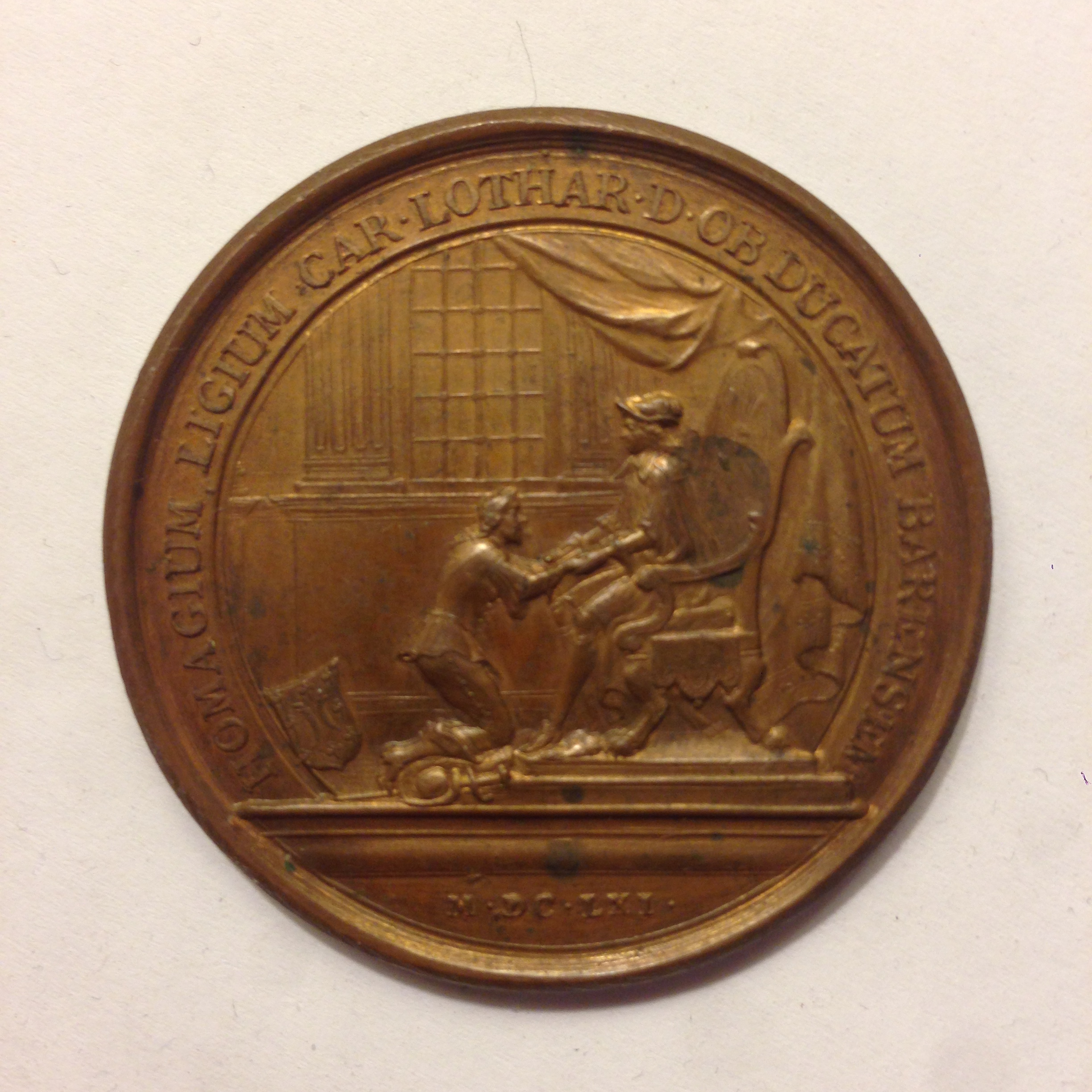 Hommage de Charles IV à Louis XIV pour le Barrois mouvant au Louvre en 1661Latina: Homagium ligium Car[oli] Lothar[ingiae] D[ucis] ob Ducatum Barensem MDCLXI